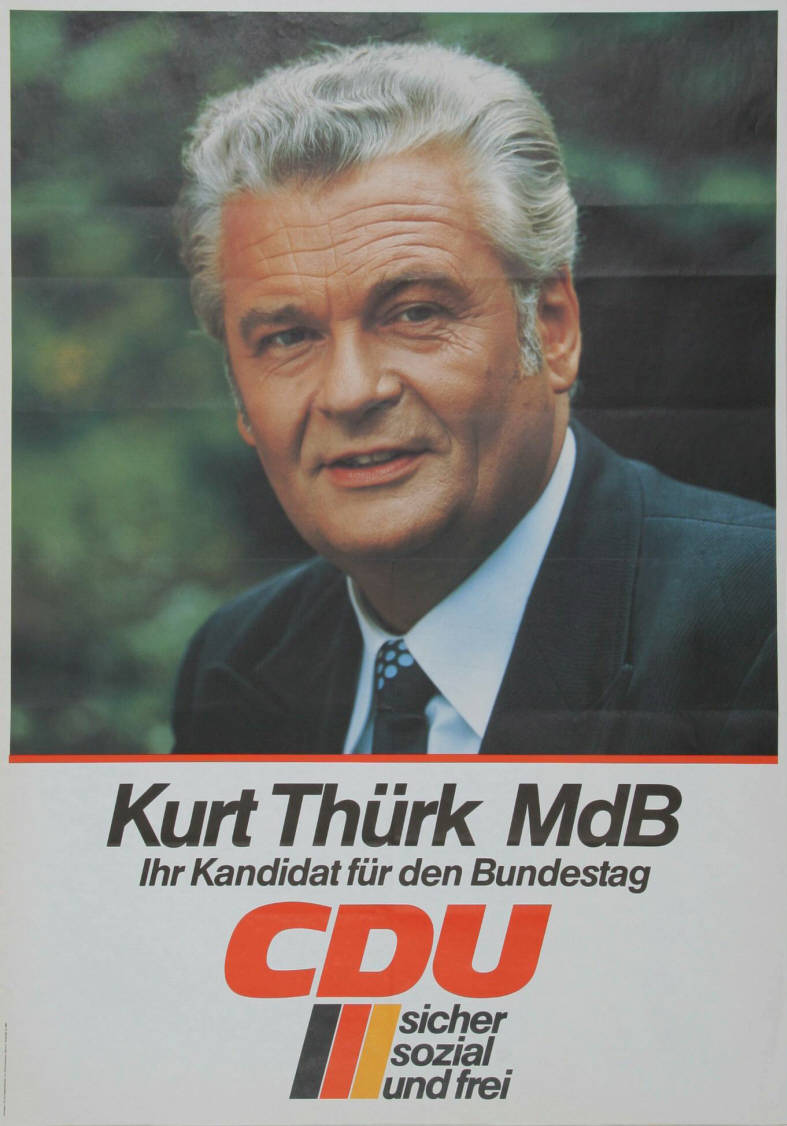 Kurt Thürk MdB Ihr Kandidat für den Bundestag CDU sicher sozial und frei Abbildung: Porträtfoto Plakatart: Kandidaten-/Personenplakat mit Porträt Auftraggeber: CDU-Bundesgeschäftsstelle, Abt. Öffentlichkeitsarbeit, Bonn Objekt-Signatur: 10-001: 1833 Bestand: Plakate zu Bundestagswahlen (10-001) GliederungBestand10-18: Plakate zu Bundestagswahlen (10-001) » Die 8. Bundestagswahl am 3. Oktober 1976 » CDU » Mit Porträtfoto Lizenz: KAS/ACDP 10-001: 1833 CC-BY-SA 3.0 DE